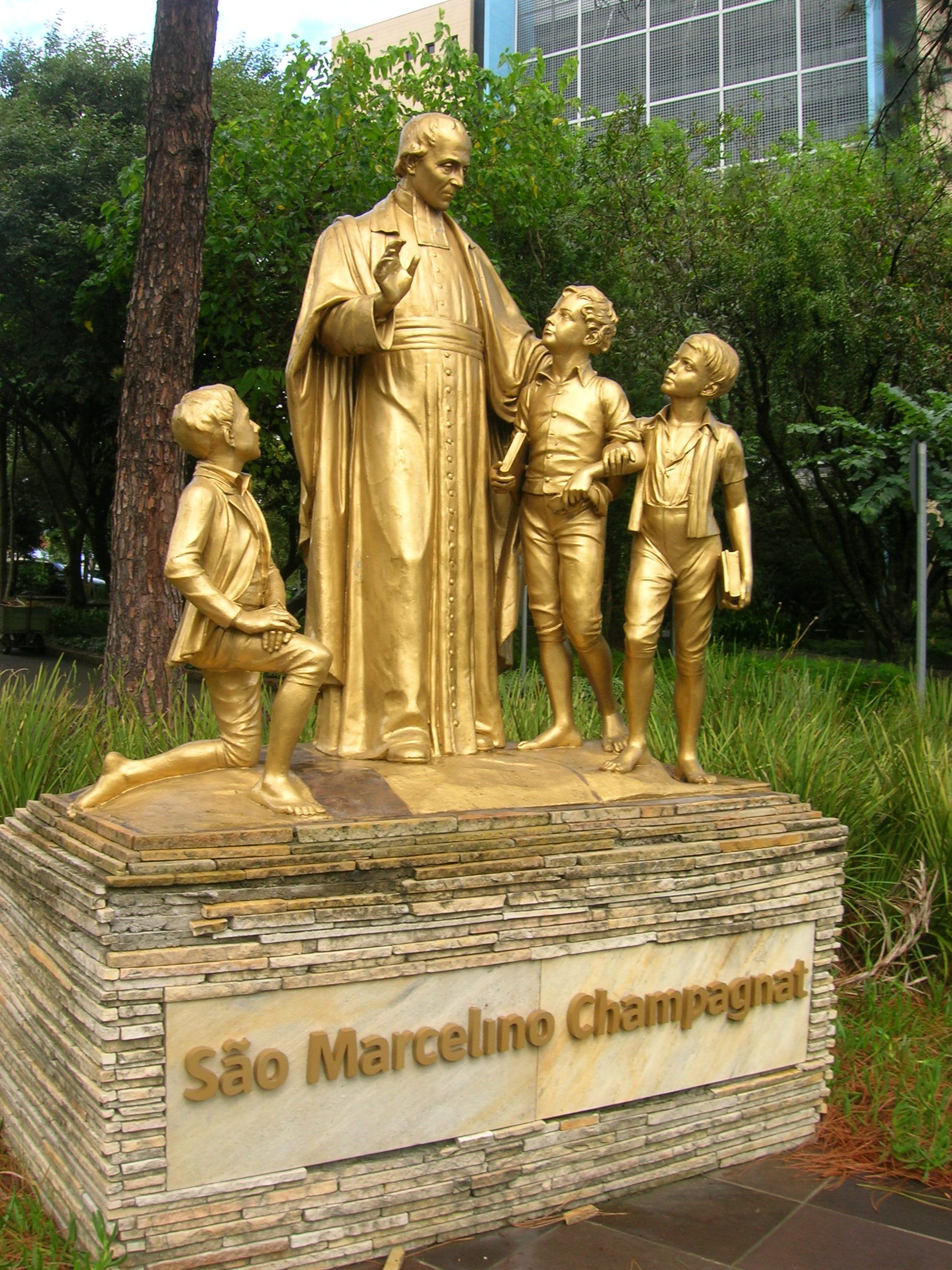 Estátua de São Marcelino Champagnat, no Campus Central da PUCRS.